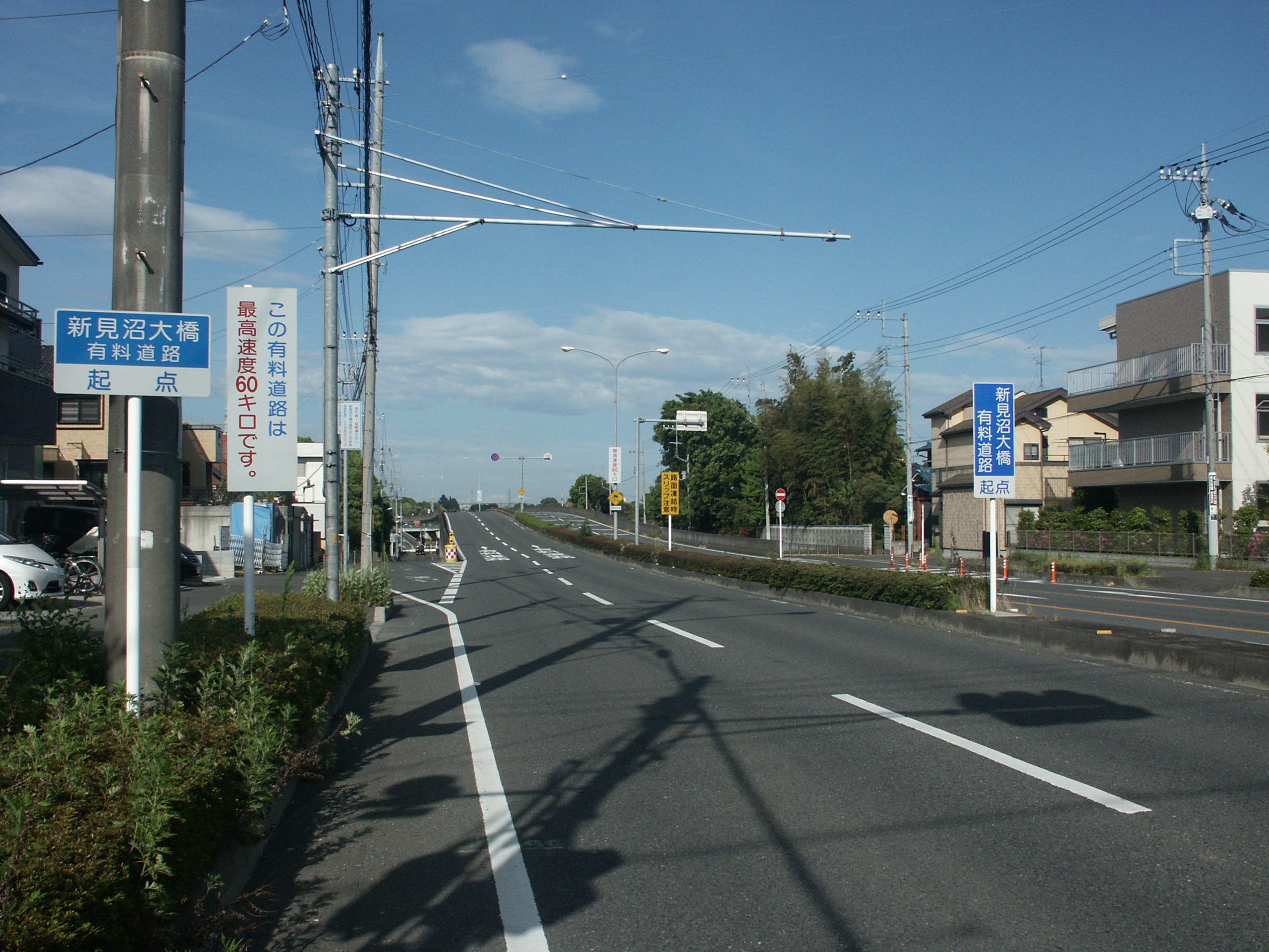 国道463号線新見沼大橋有料道路（さいたま市緑区芝原三丁目付近）